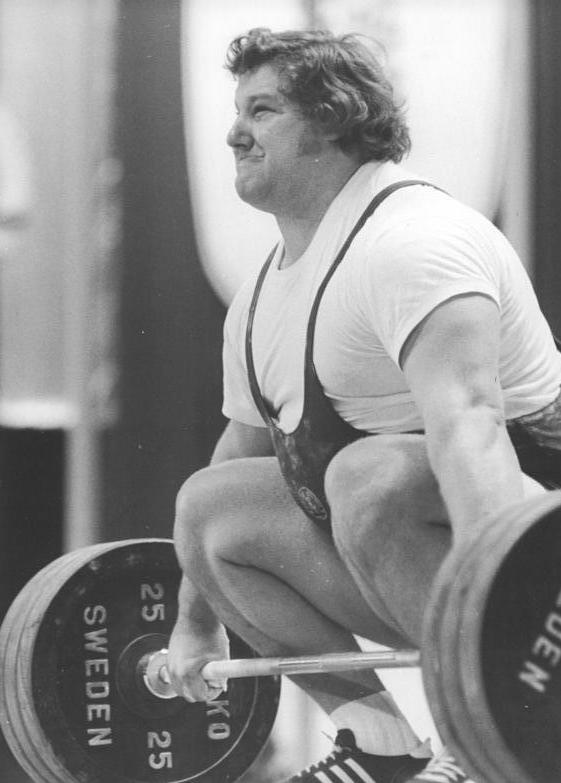 Gerd Bonk ADN-ZB Mittelstädt 08.11.1979-str-Berlin: Arbeitsmaterial zur 33. Weltmeisterschaft im Gewichtheben-Entscheidung im Superschwergewicht-Ein "Gewichtiges" Wort im Kampf um die Medaillen will der DDR-Heber Gerd Bonk (Archivfoto) mitsprechen, der neben Weltmeister Jürgen Heuser als zweiter DDR-Vertreter in dieser Gewichtsklasse in Saloniki am Start ist.